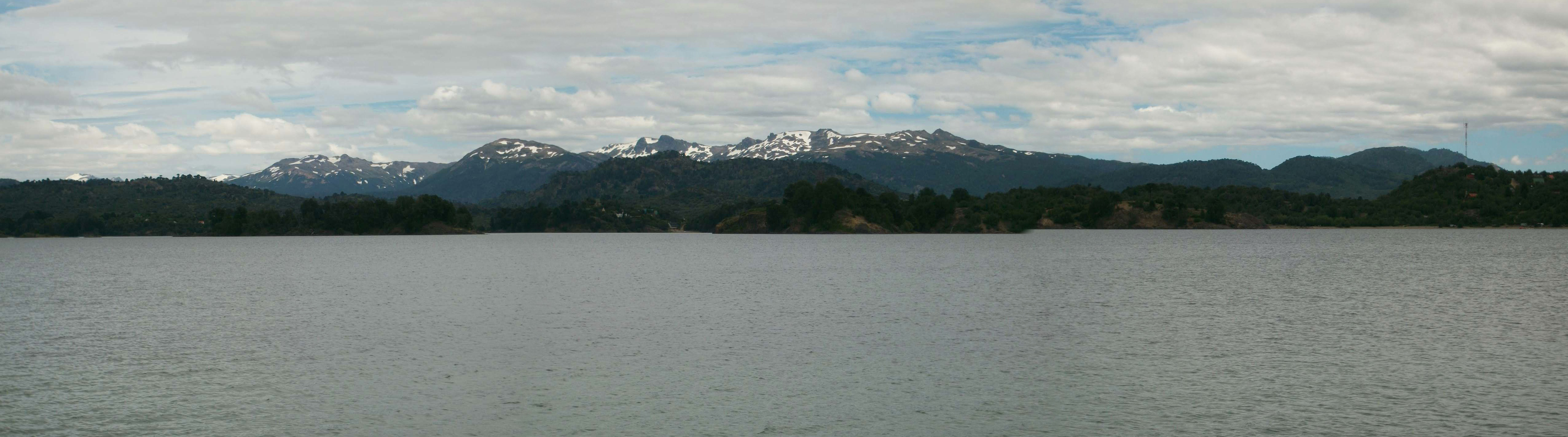 Paisaje de Villa Pehuenia